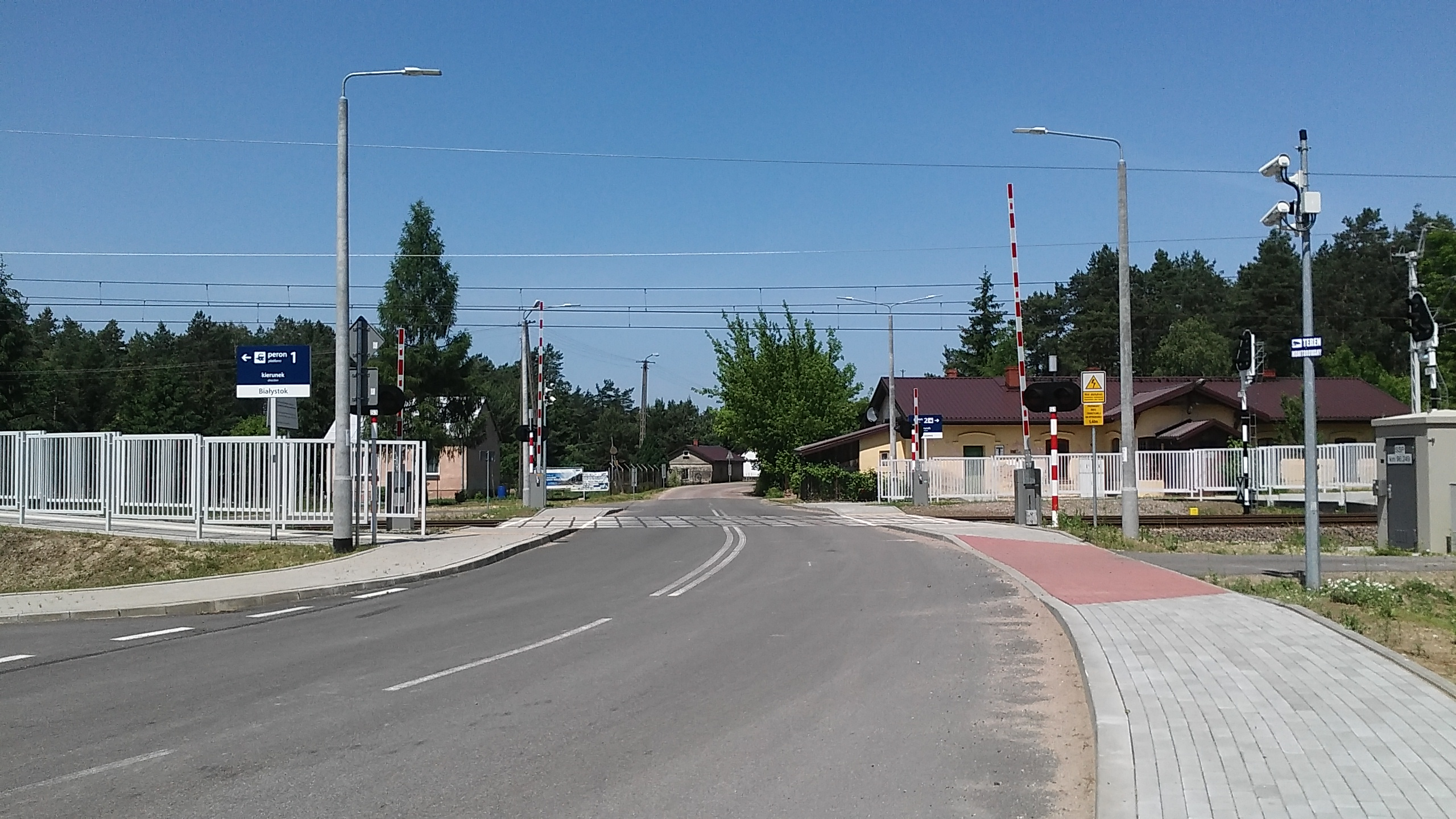 przystanek kolejowy Zaręby Kościelne - przejazd kolejowo-drogowy w ciągu drogi powiatowej 2615W, widok od południa